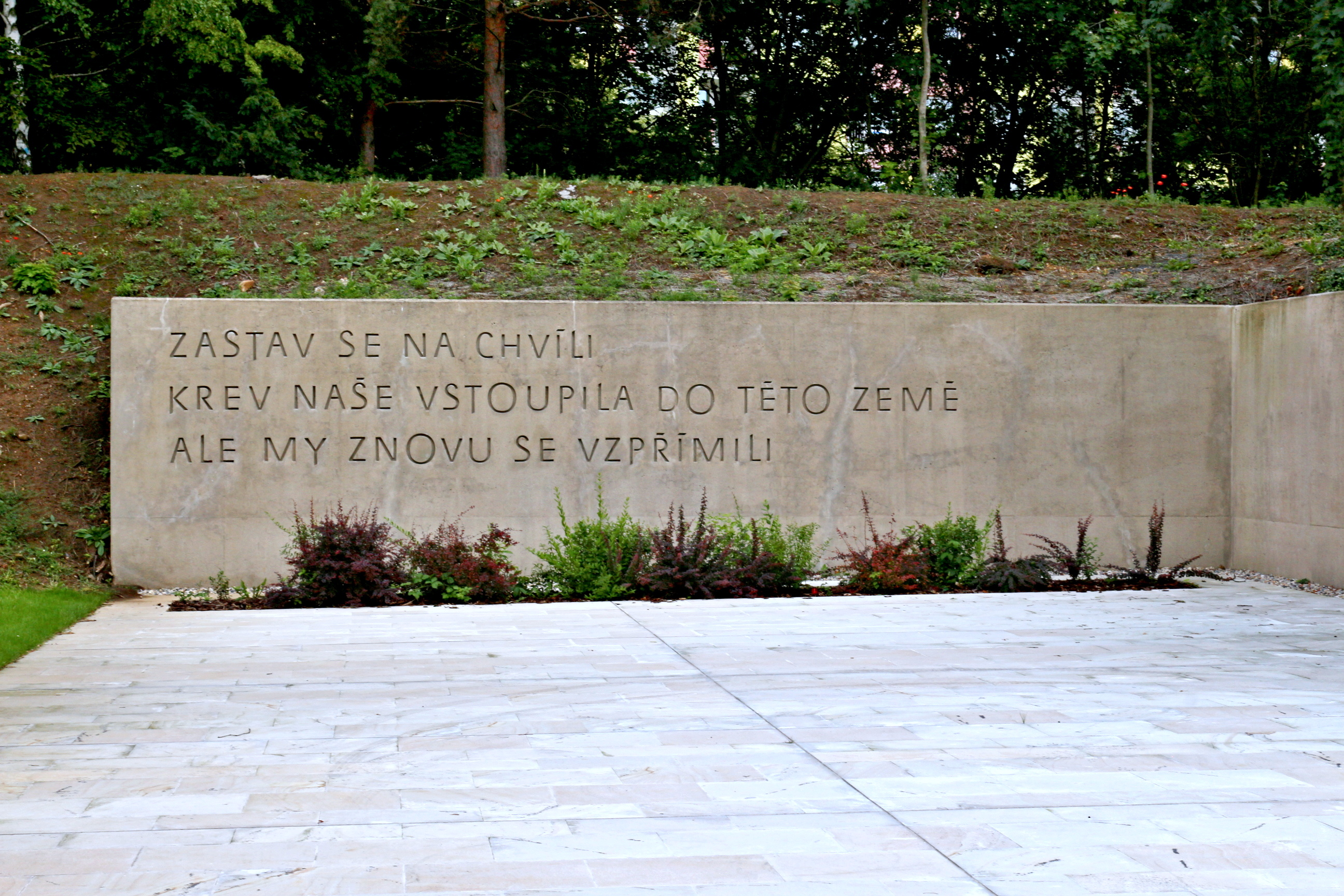 Kobylisy památník zastřeleným osobám